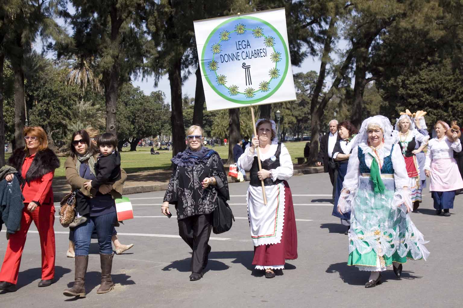 Dia del inmigrante 023